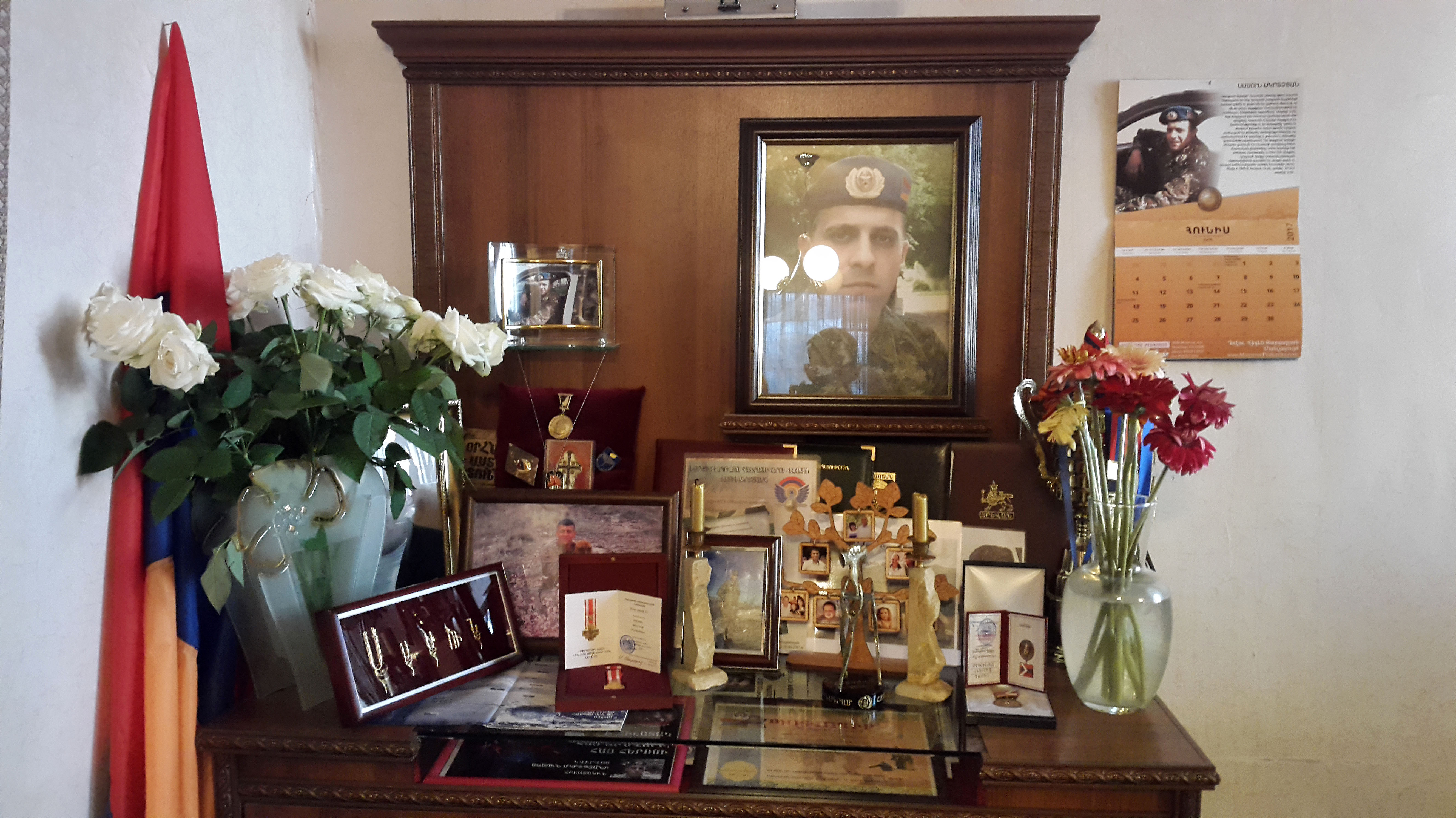 Սասուն Մկրտչյանին նվիրված անկյուն